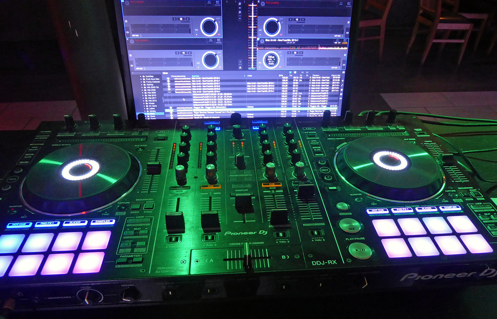 Digital Dj utrustning.